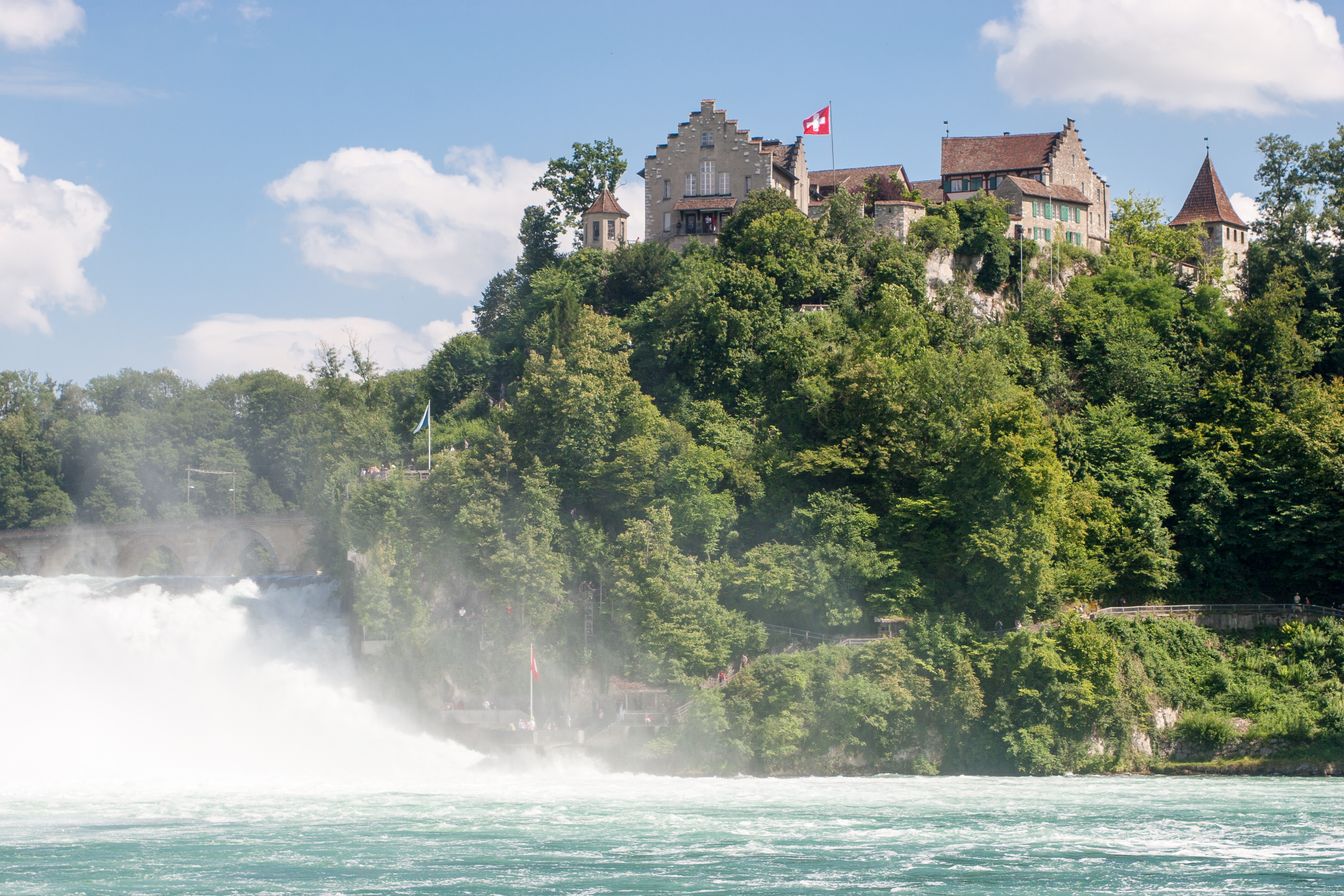 Schloss Laufen am Rheinfall, in 2008 noch ohne Beton-Liftturm